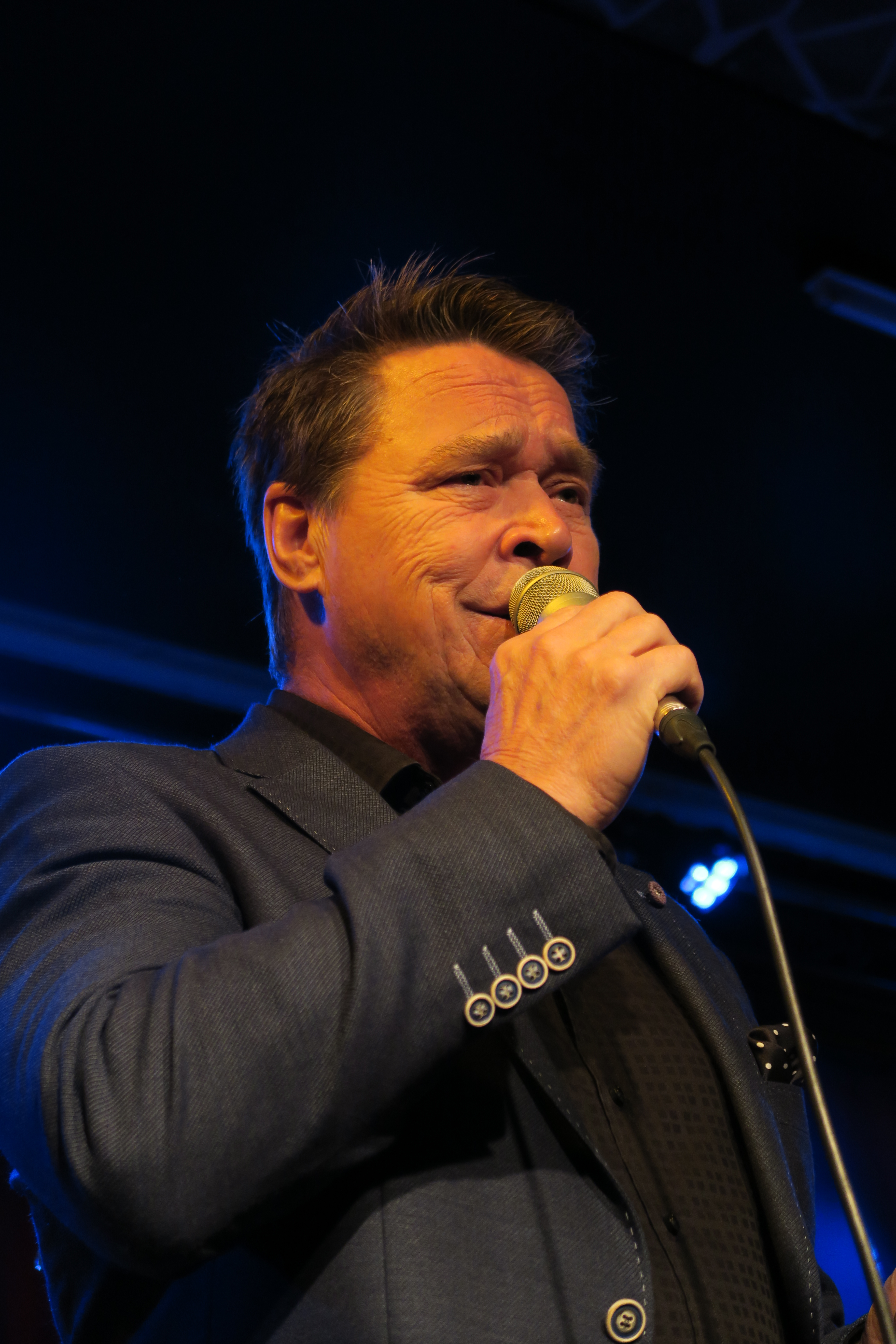 Markku Aro suomalainen laulaja